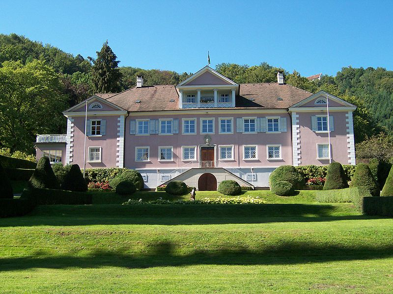 Bodmaner Schloss